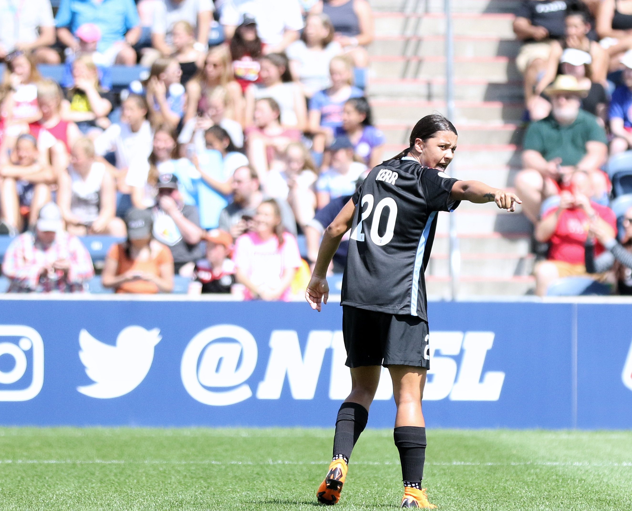 Sam Kerr